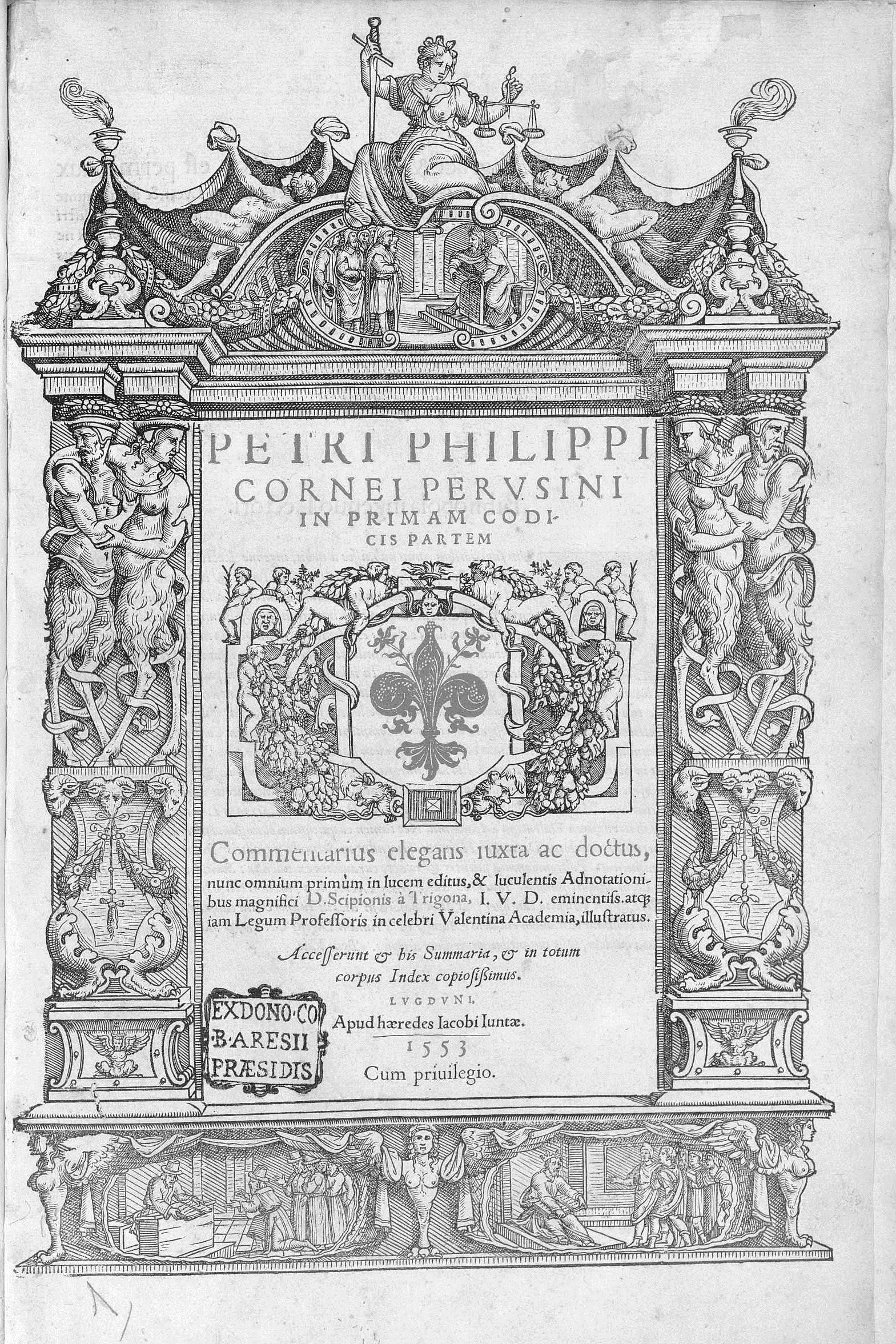 Frontespizio